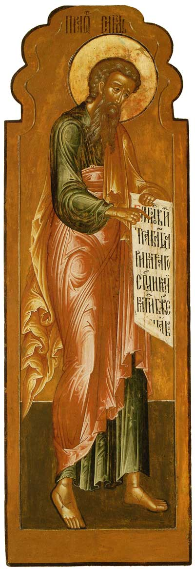 Праотец Сим. Праотеческий чин из главного иконостаса ц. Иоанна Златоуста в Коровниках в Ярославле